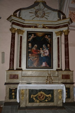 Autel de la Sainte Famille, retable et toile de la Sainte Famille.